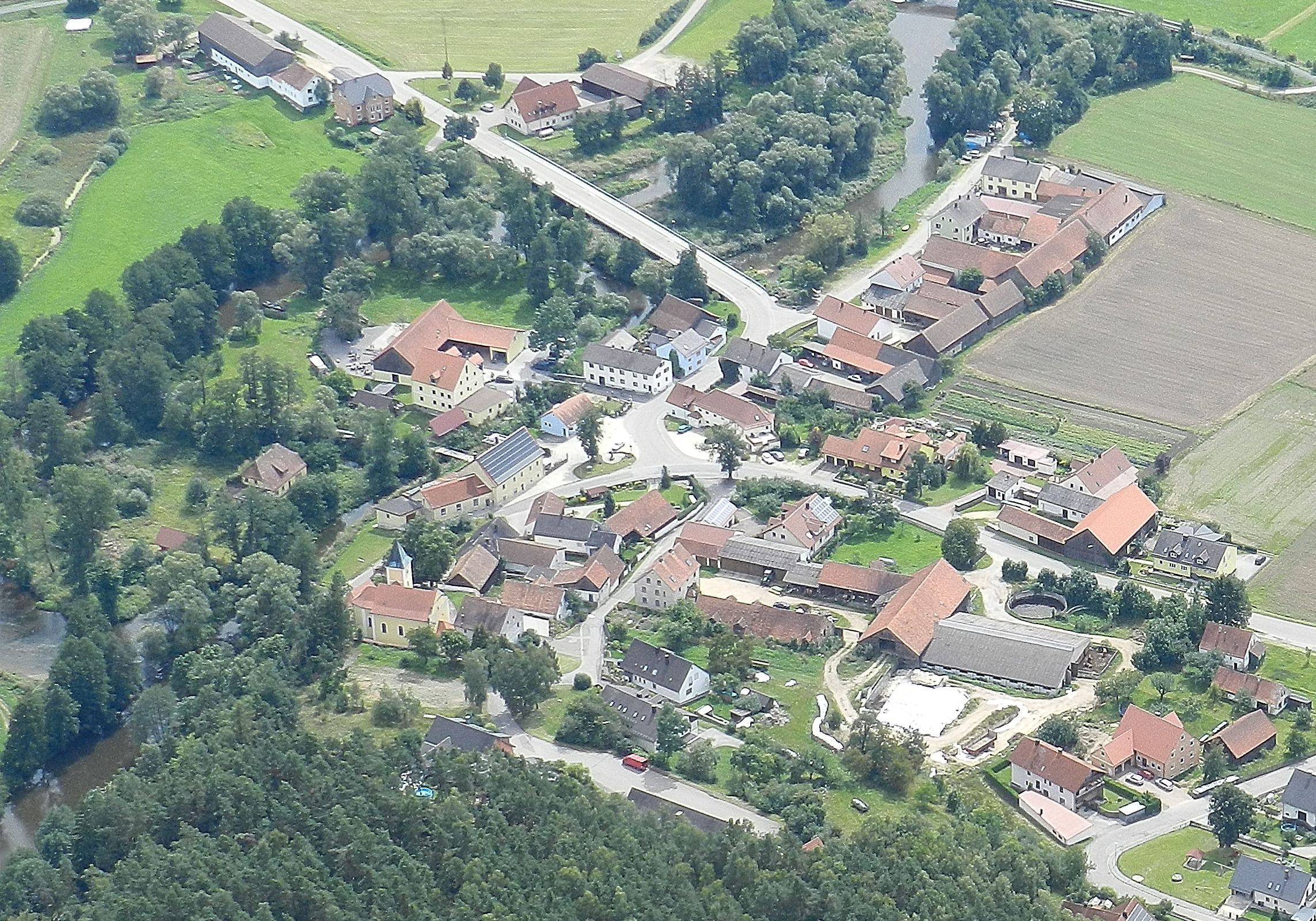 Schwarzach bei Nabburg, Ortskern; links im Bild die Pfarrkirche St. Ulrich (Landkreis Schwandorf, Oberpfalz, Bayern). (2011)